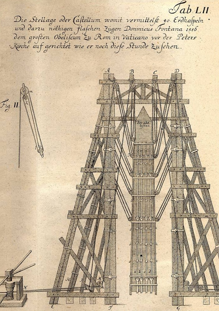 Text über dem Bild: Tab LII Die Stellage oder Castellum womit vermittelst 40 Erdhaspeln und darzu nöthingen flaschen Zügen Dominicus Fontana 1586 dem grosten Obeliscum Zu Rom in Vaticano vor der Peters Kirche auf gerichtet wie er noch diese Stunde zu sehen.